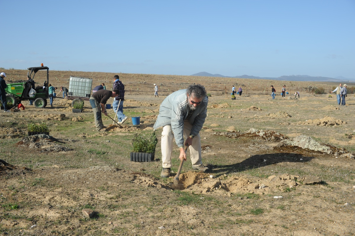 Plantando encinas en Pescueza (Cáceres)